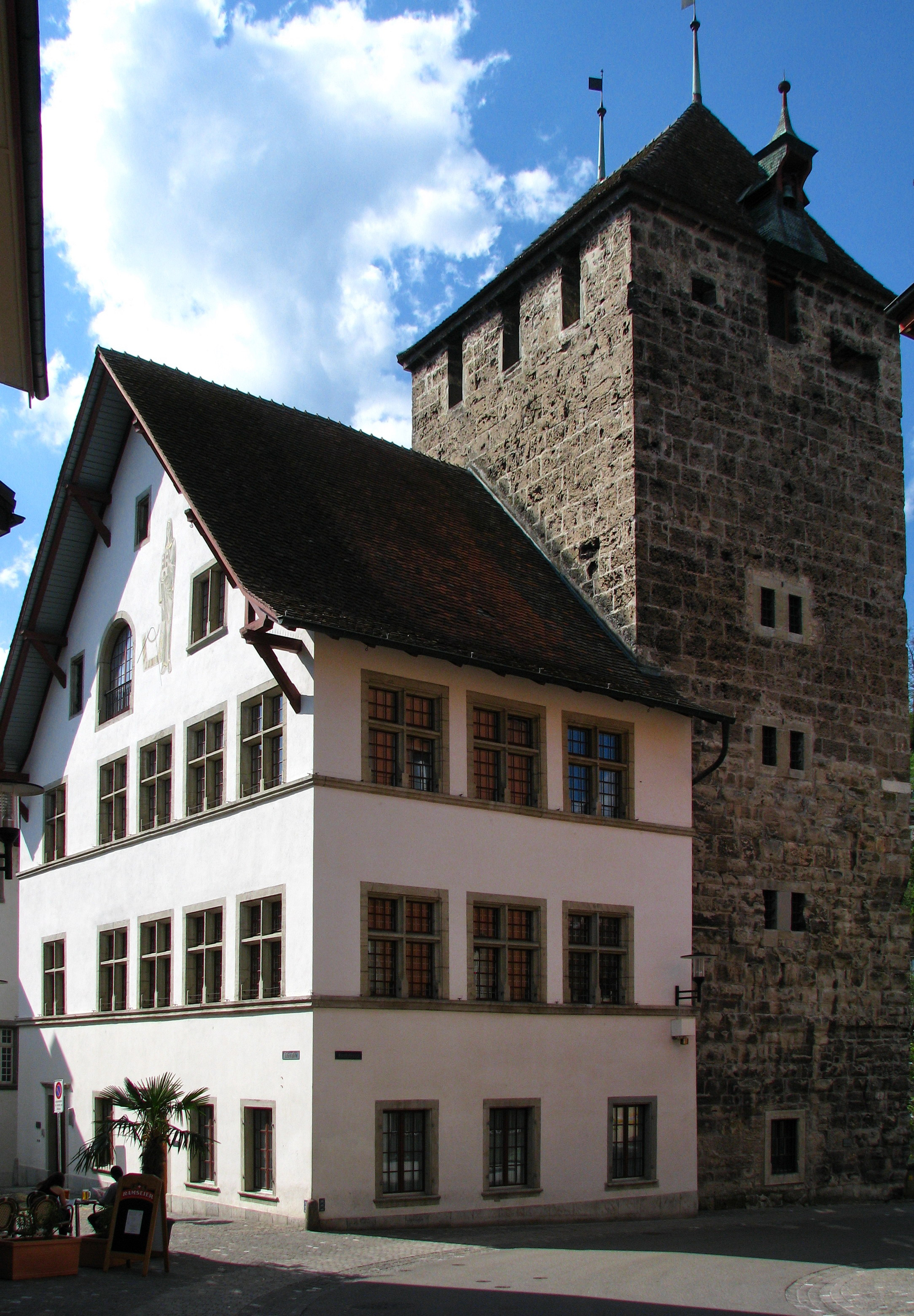 Rathaus & Schwarzer Turm in Brugg (AG)